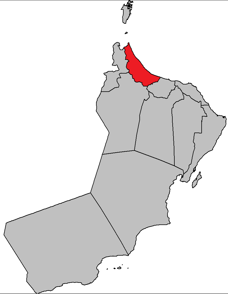 オマーン（Oman）・北バーティナ地方（Al Batinah North Governorate）の地図（Map）。